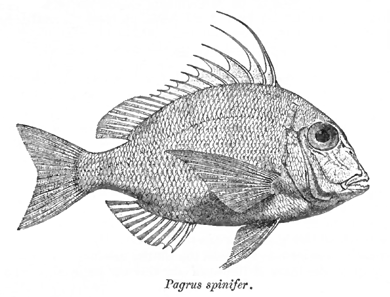 Pagrus spinifer = Argyrops spinifer (Forsskål, 1775)